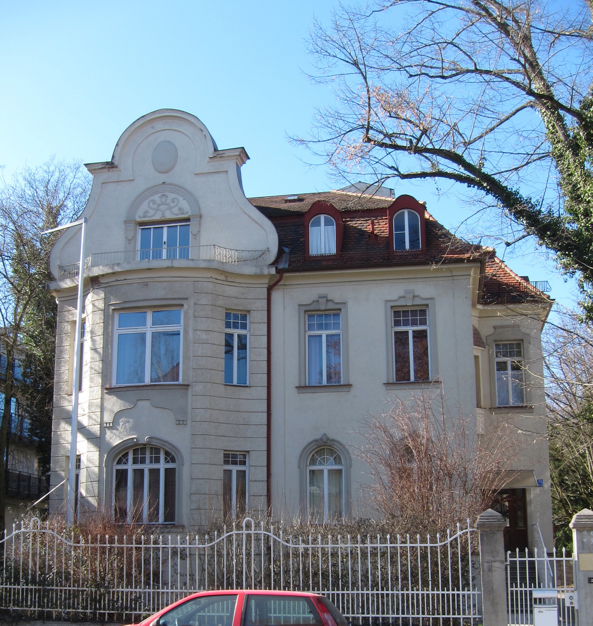 Möhlstraße 21; Malerische Villa, neubarock, um 1900.